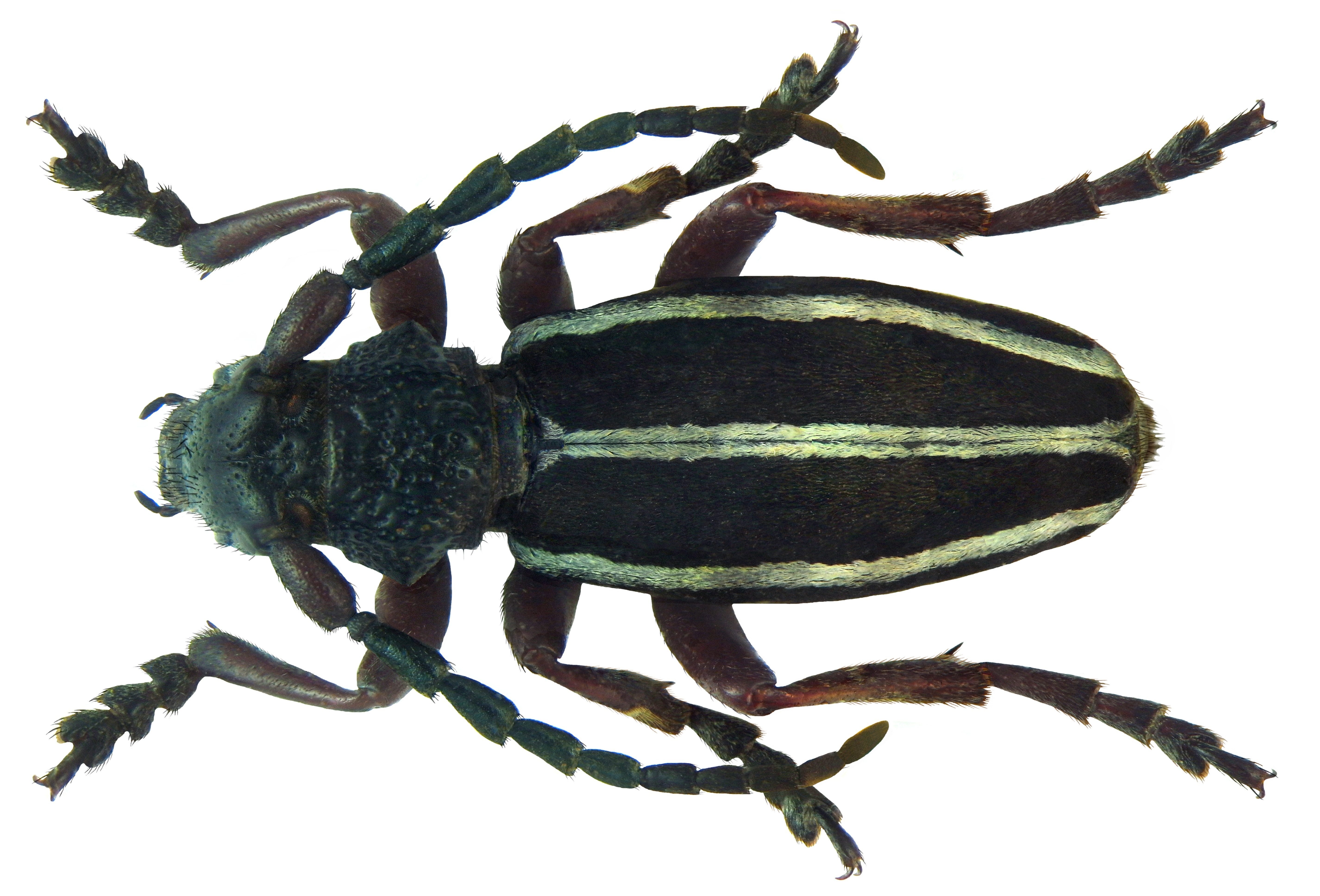 Familie: Cerambycidae Groesse: 14,8 mm Fundort: Türkei, Kizilcahamam leg. det. D.Bernhauer, 1981 Photo: U.Schmidt, 2011